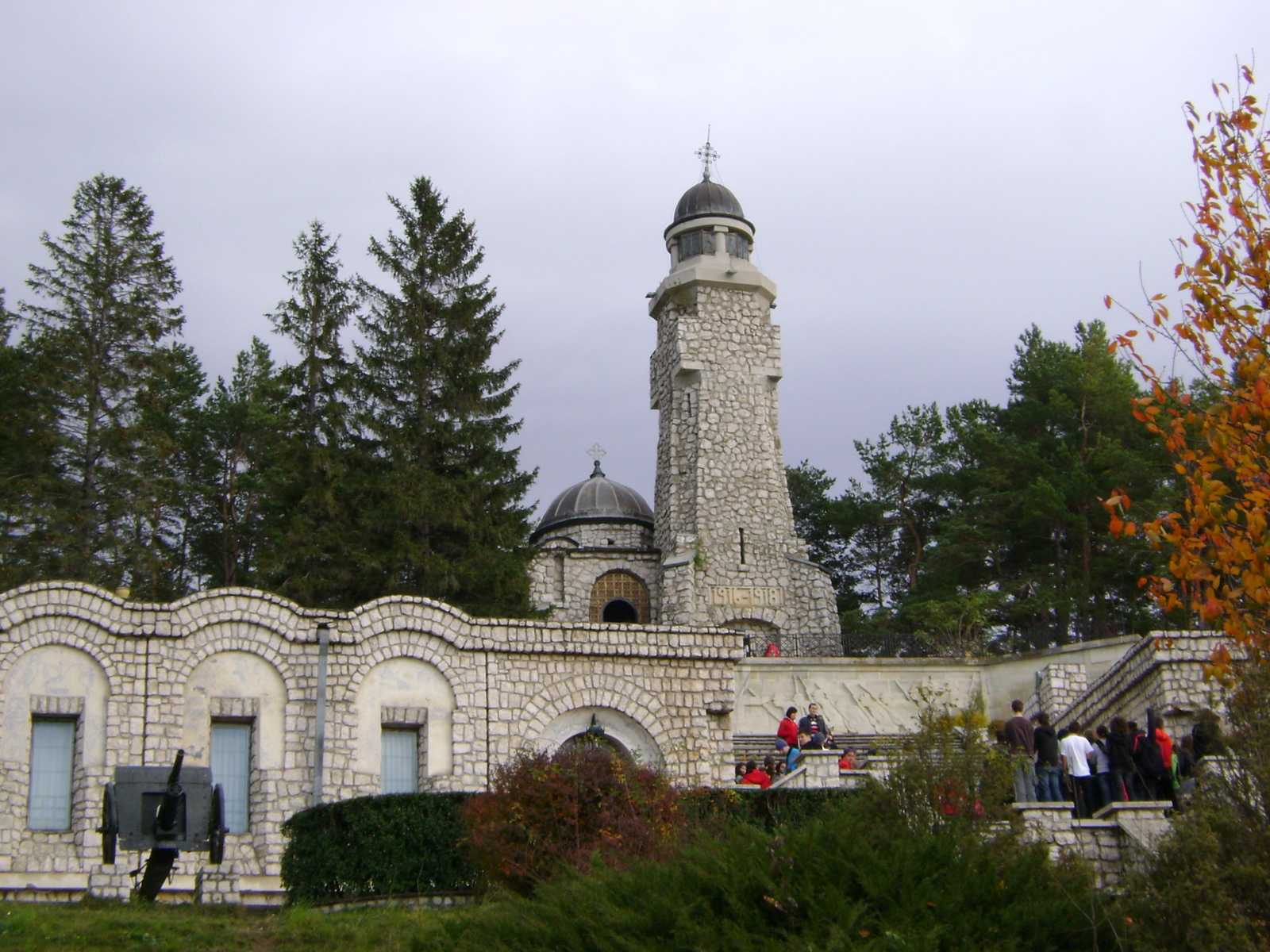 Mausoleul Eroilor de la Mateiaş, comuna Valea Mare-Pravăţ, judeţul Argeş